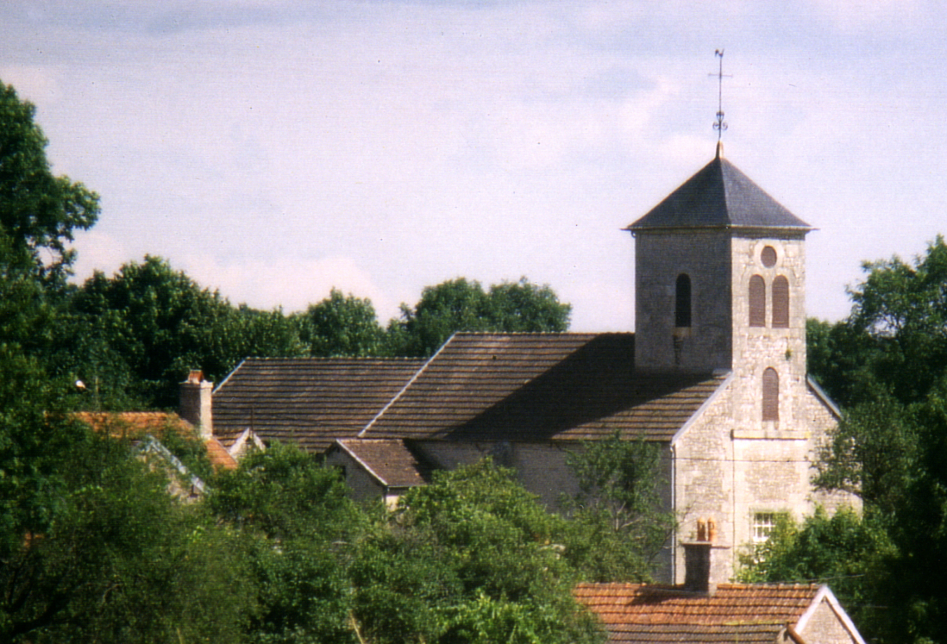 Eglise Notre Dame de St-Germain-Blessey